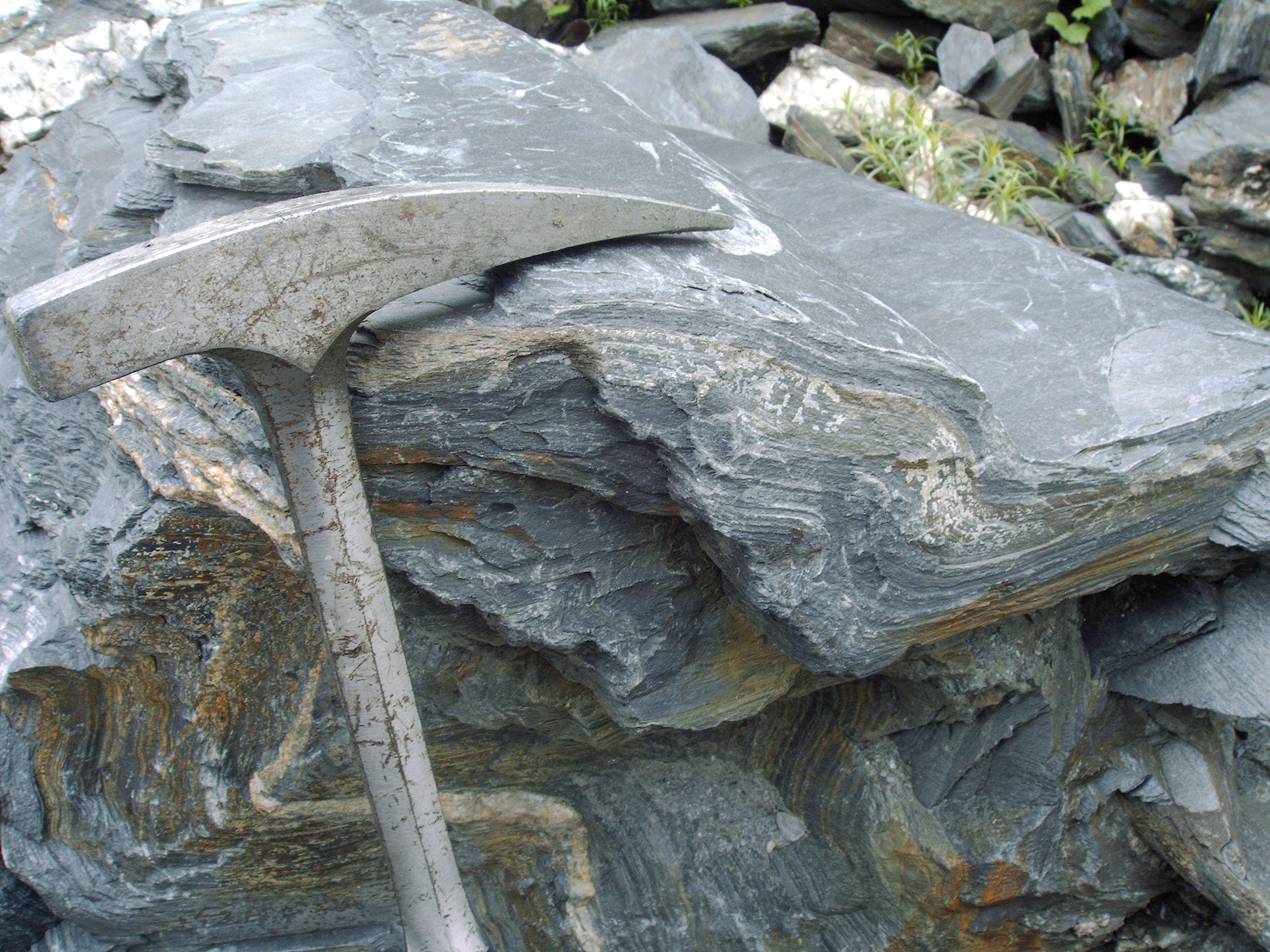 Fałdy z płynięcia powstałe w górno dewońskich fyllitach facji kulmu, kop. Dewon, Jarnołtówek, Góry Opawskie